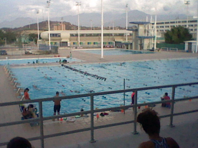 Piscina Olimpica